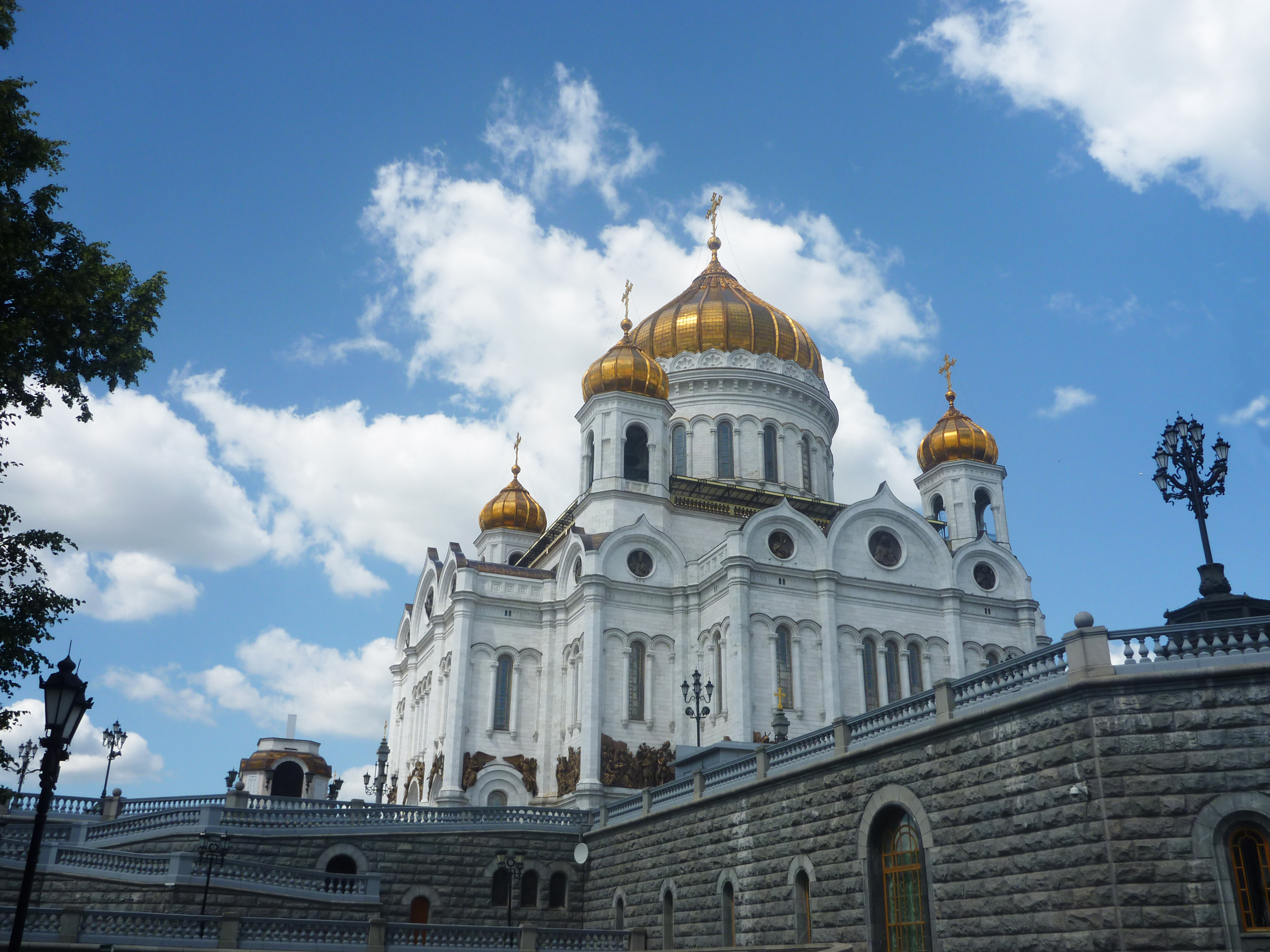 Храм Христа Спасителя (построен в 1832 г., освящен в 1883 г.): Волхонка ул., дом 15, Хамовники, Центральный округ, Москва